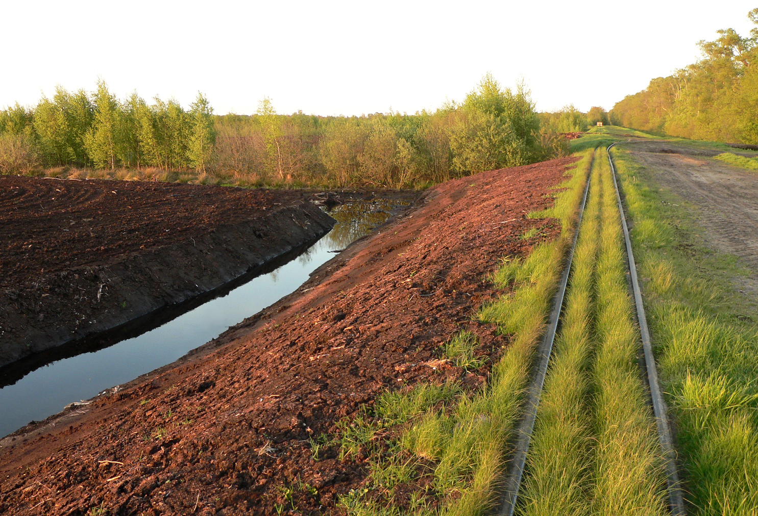 Torfabbau im Campemoor